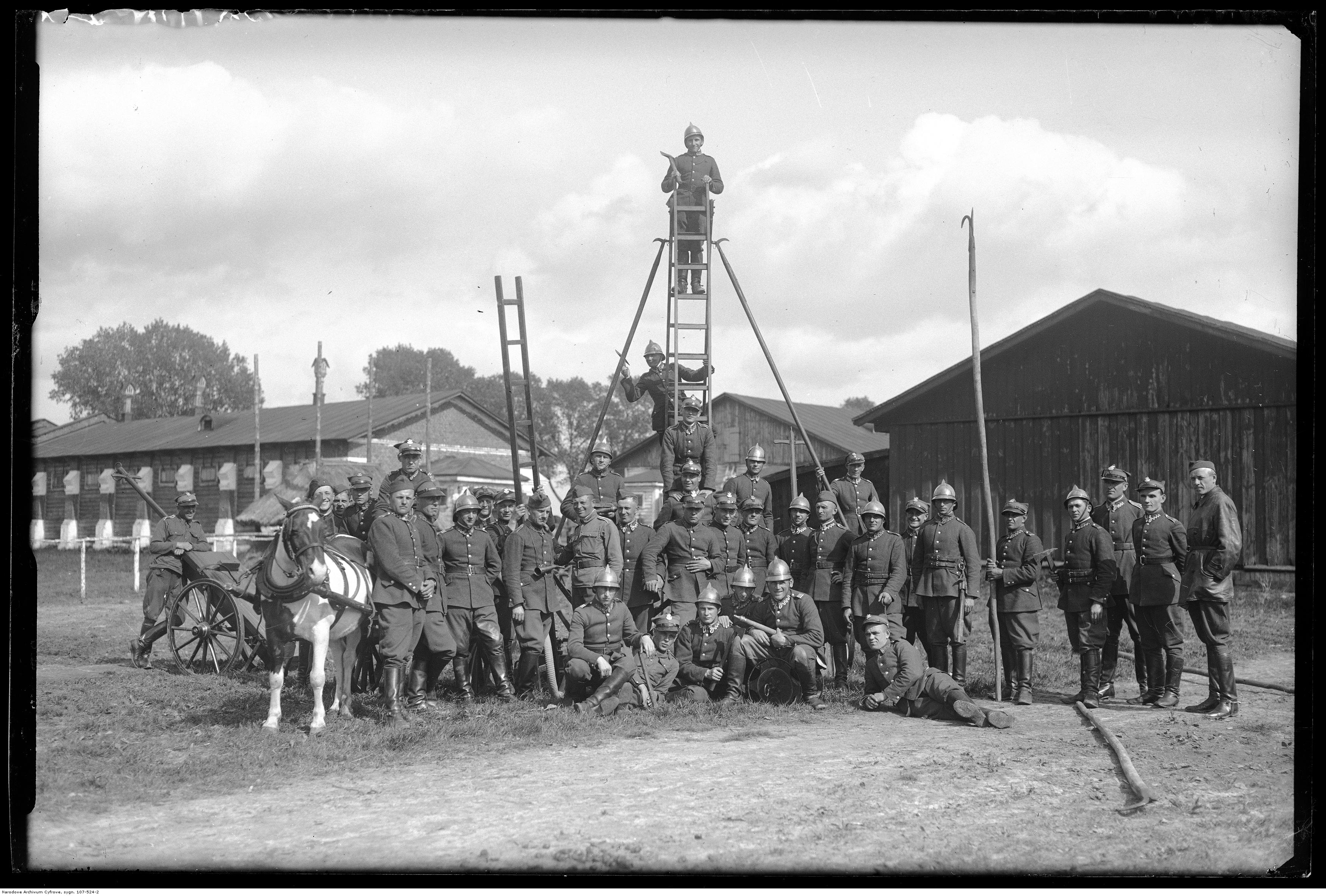 Grupa strażaków pułkowych.